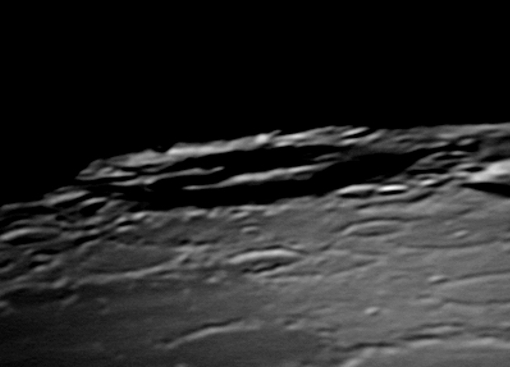 Cráter Jenófanes - fotografía tomada con cámara web, telescopio newtoniano de 150mm de apertura y 750mm de distancia focal, en proyección ocular de 6mm.